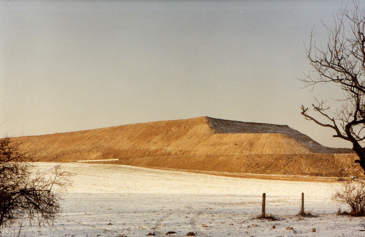 Wysypisko śmieci - granica Poznania i Suchego Lasu, styczeń 1993r.